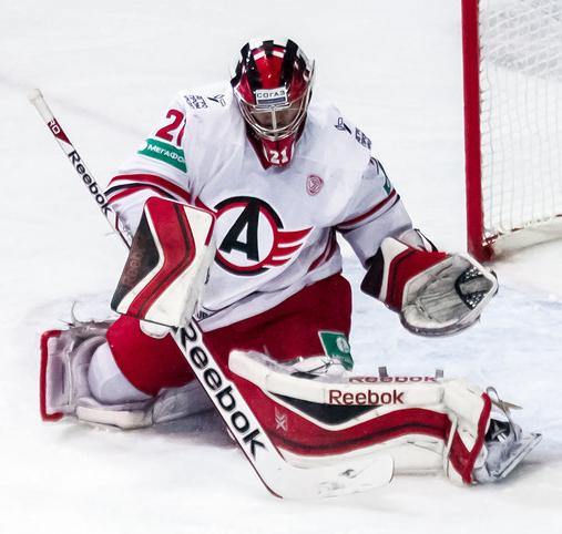 Вратарь екатеринбургского «Автомобилиста» Якуб Коварж во время матча чемпионата КХЛ против хабаровского «Амура» 12 ноября 2014 года.